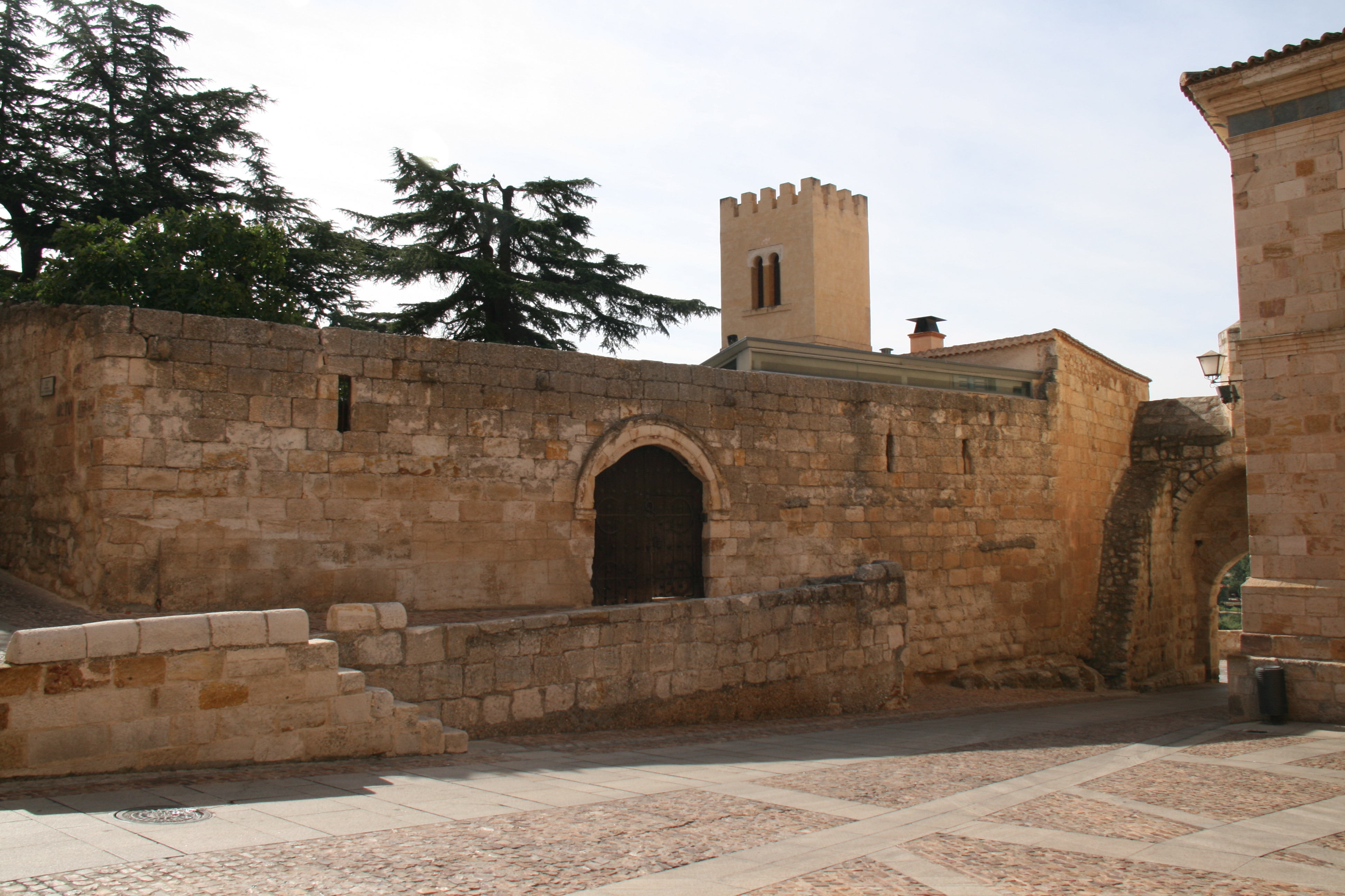 Casa de Rodrigo Díaz de Vivar - Zamora